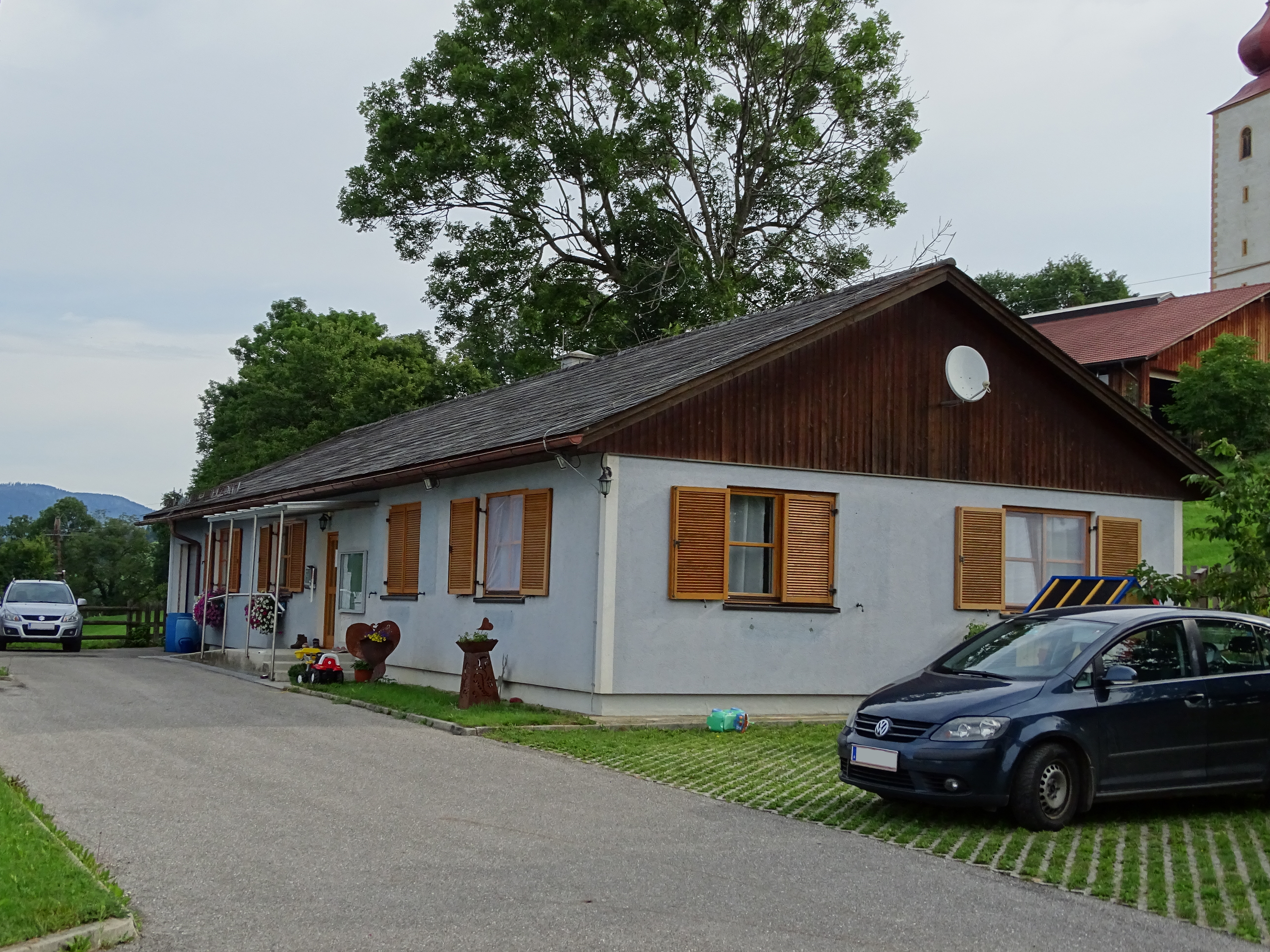 Das ehemalige Gemeindeamt von Gschnaidt. Heute befindet sich im Gebäude eine Servicestelle der Gemeinde Gratwein-Straßengel